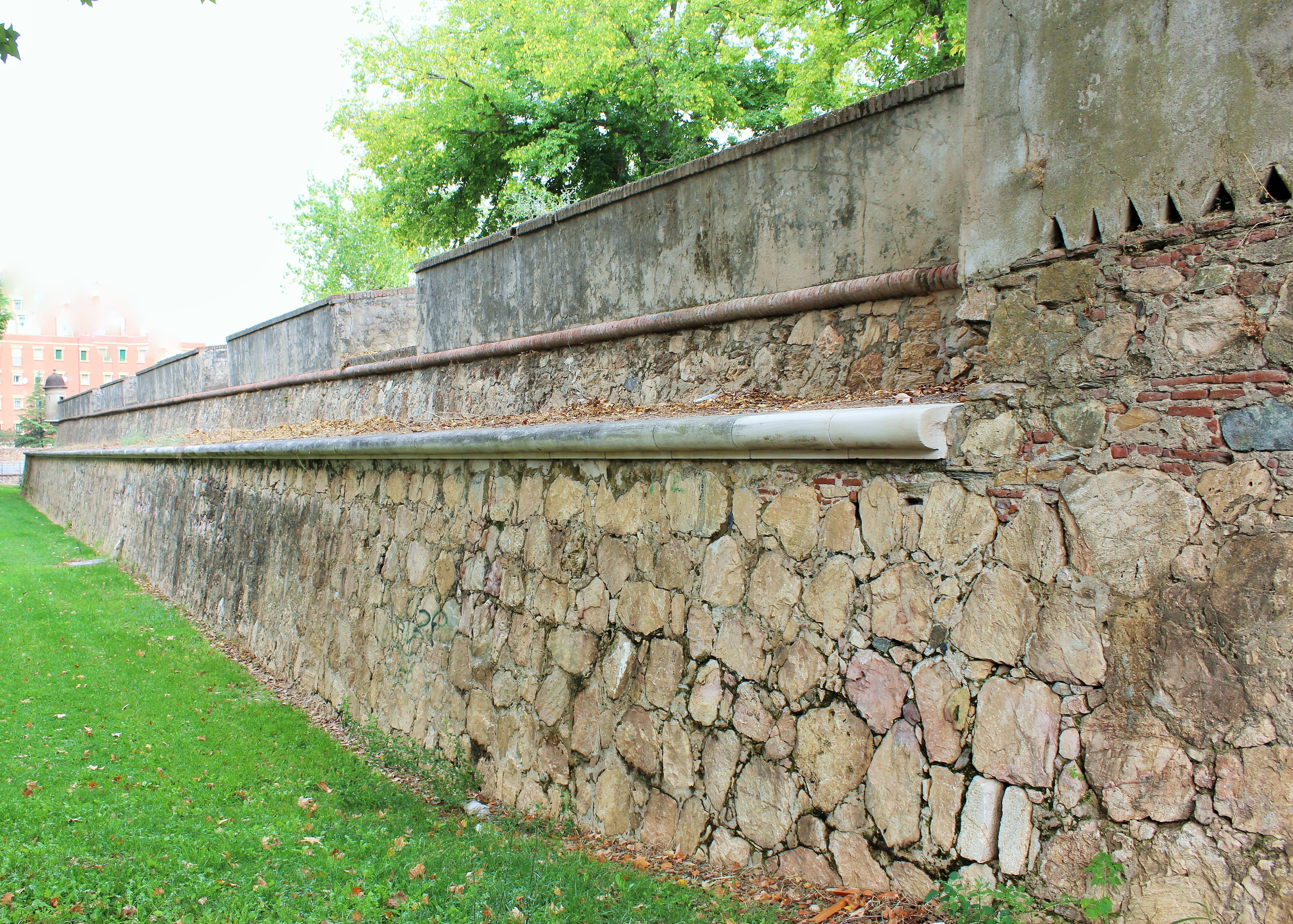 Detalle del verduguillo en el lienzo.